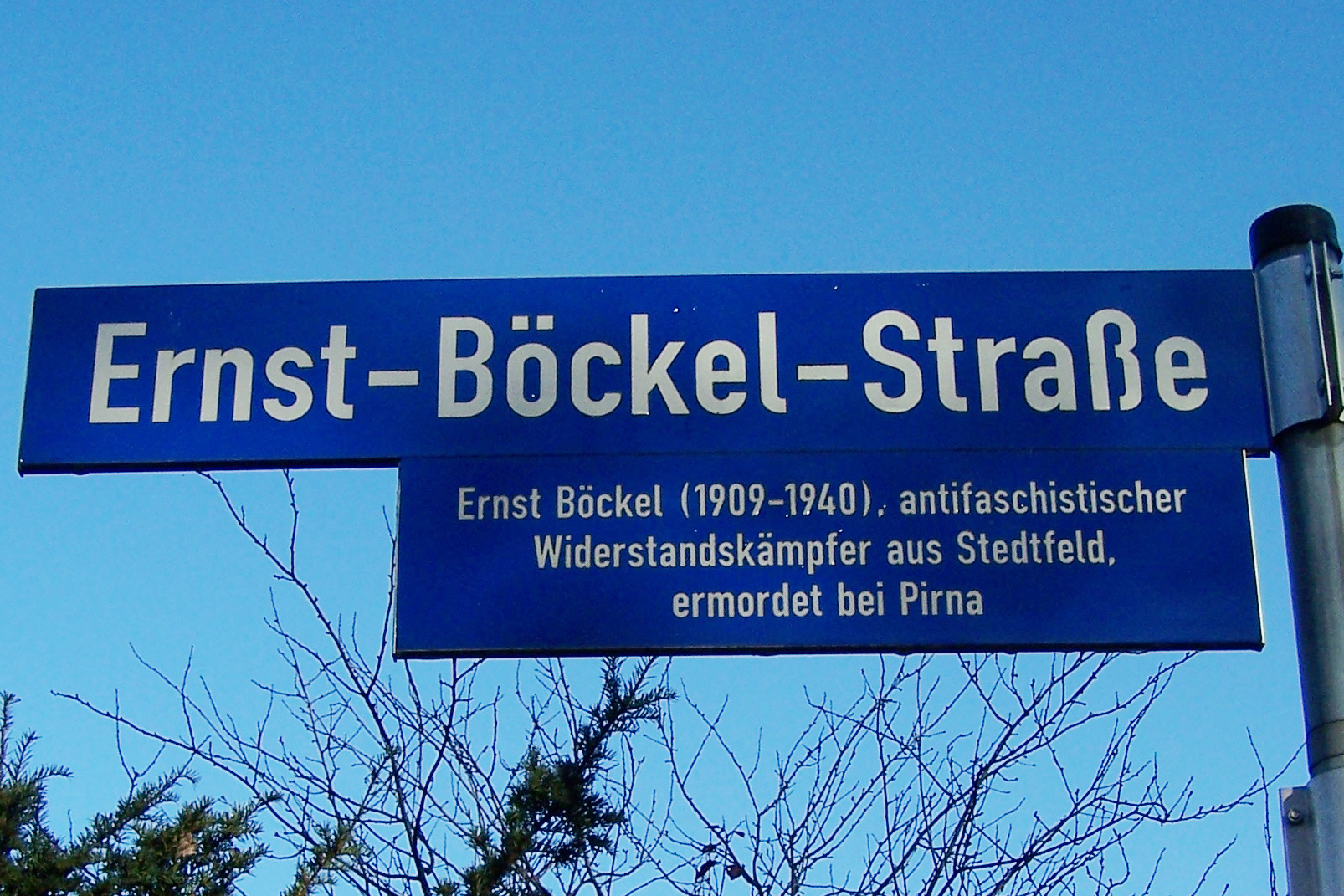 Straßenschild und Erläuterung zur Ernst-Böckel-Straße in Eisenach.